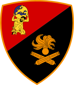 Scudetto del Comando Artiglieria dell'Esercito.